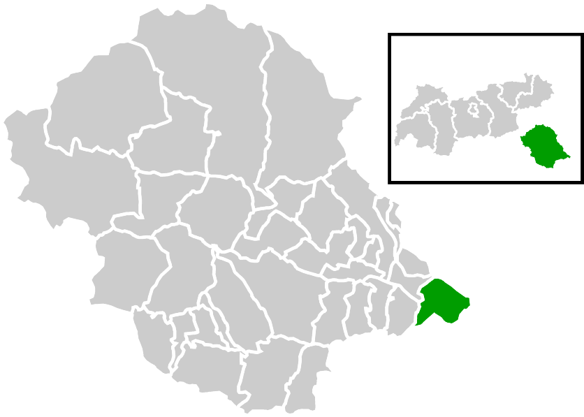 Lage der Gemeinde innerhalb des Bezirks Lienz